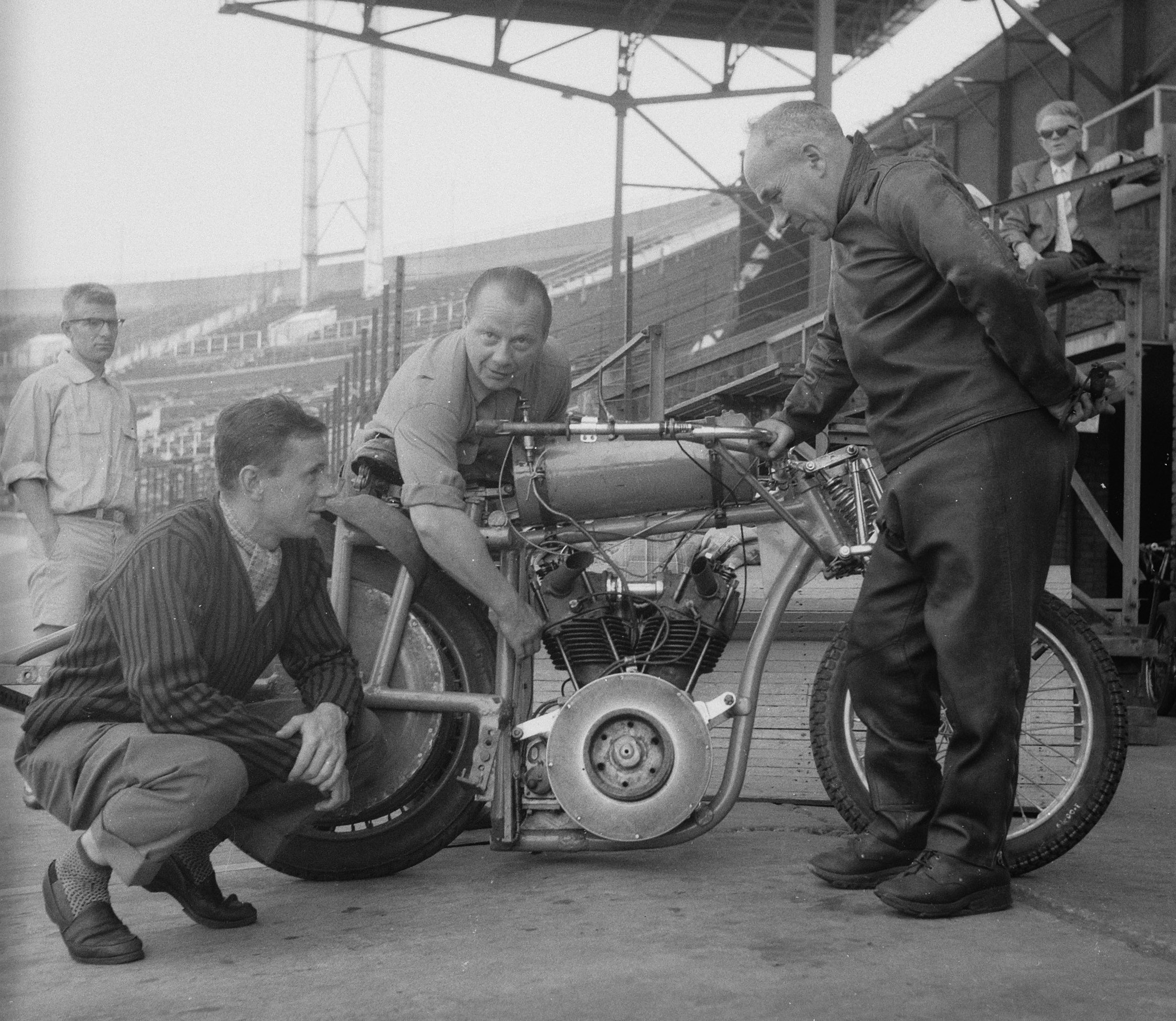 Collectie / Archief : Fotocollectie Anefo Reportage / Serie : [ onbekend ] Beschrijving : Gangmaker Ingelghem met zijn nieuw gekochte motor Wierstra (links) in gesprek met Ingelghem (rechts) Datum : 10 augustus 1959 Fotograaf : Noske, J.D. / Anefo Auteursrechthebbende : Nationaal Archief Materiaalsoort : Negatief (zwart/wit) Nummer archiefinventaris : bekijk toegang 2.24.01.03 Bestanddeelnummer : 910-5804